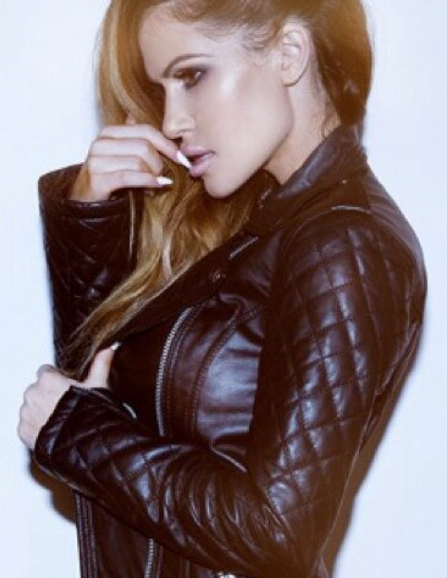 Kimberly Cole from "The Prelude"